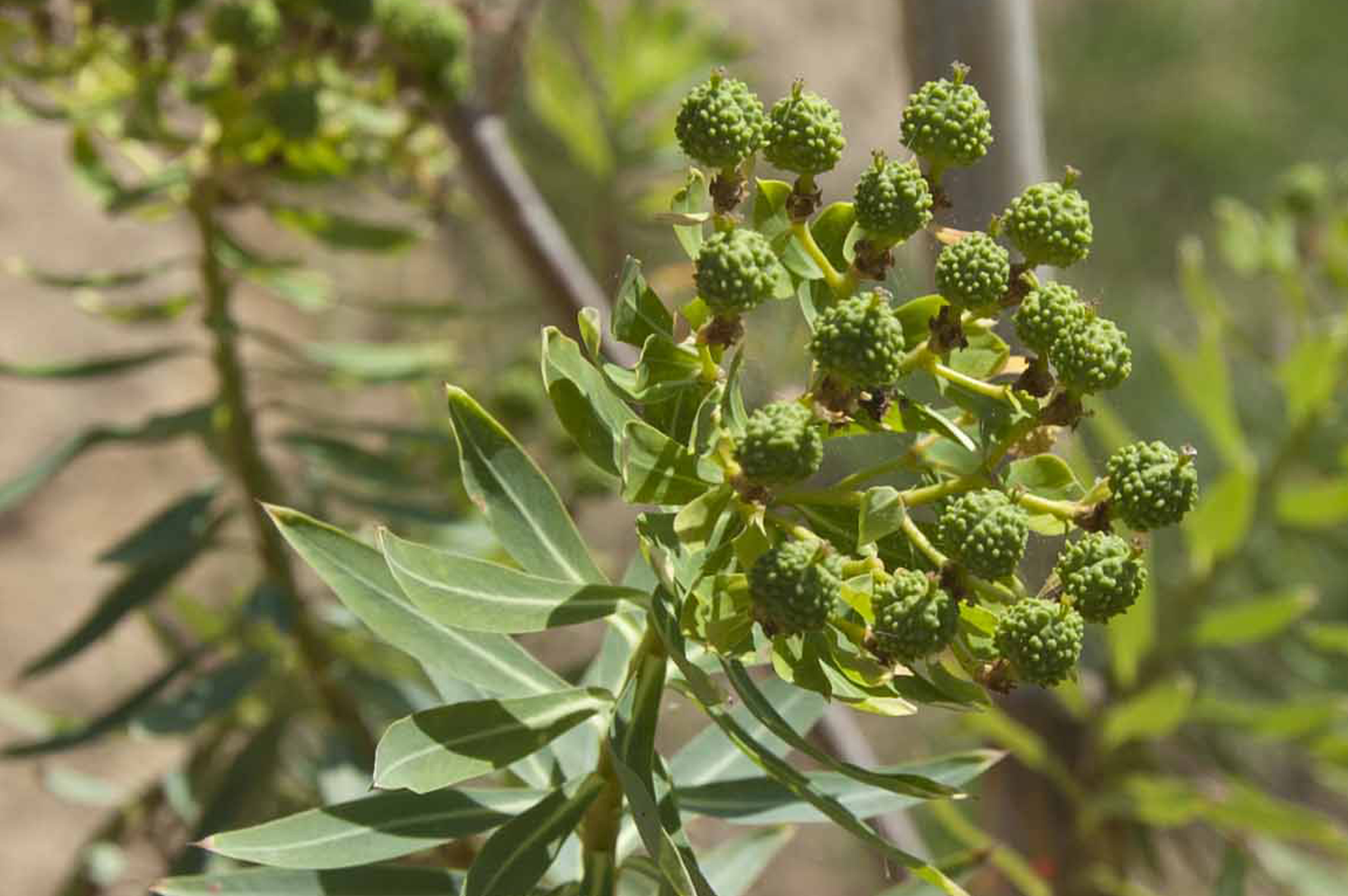 Euphorbia bivonae Orto botanico di Palermo